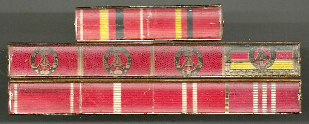 Bandschnalle für Orden der Kampfgruppe und anderer Orden